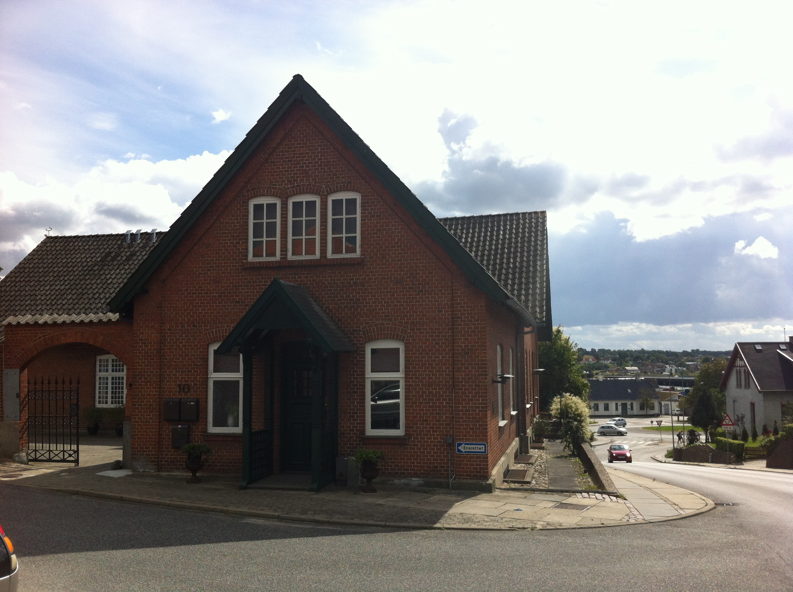 Hans Kirks barndomshjem i Jacob Møllersgade 10 9560 Hadsund